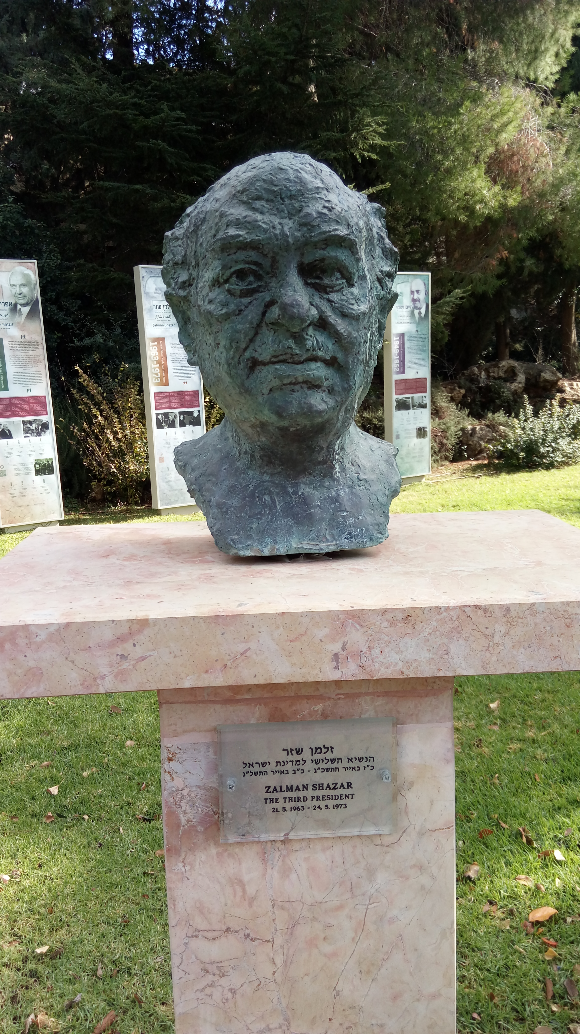 פסלו של זלמן שזר בבית הנשיא